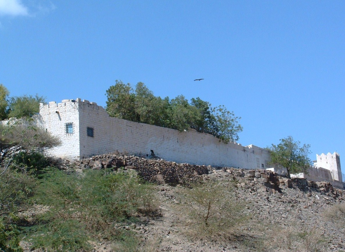 Fort érigé, à la fin des années 20, par les autorités coloniales françaises, afin de sécuriser les frontières de ce qui était alors la Côte française des Somalis; à Dikhil, Région de Dikhil, République de Djibouti.